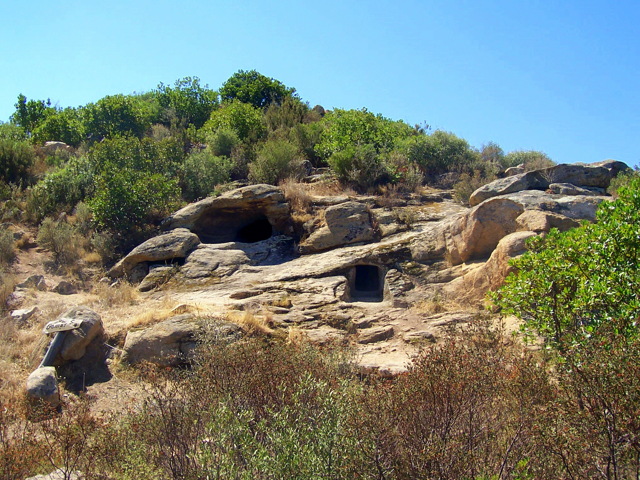 Una domus de Janas nella necropoli nuragica di Lotzorai (OG)